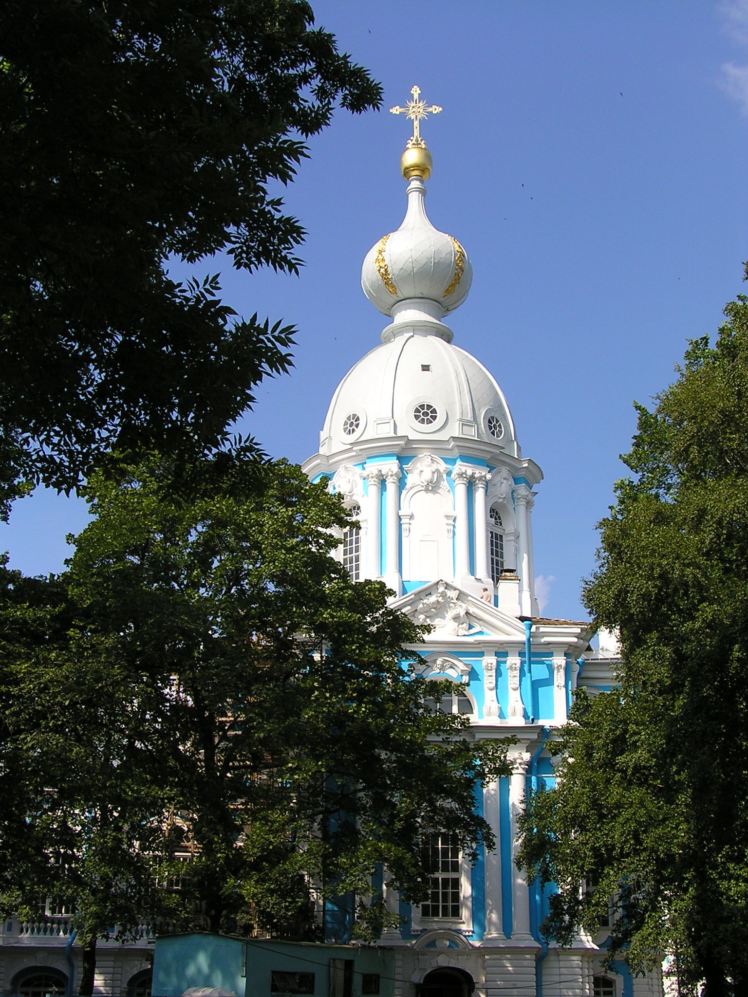 Smolny monastery